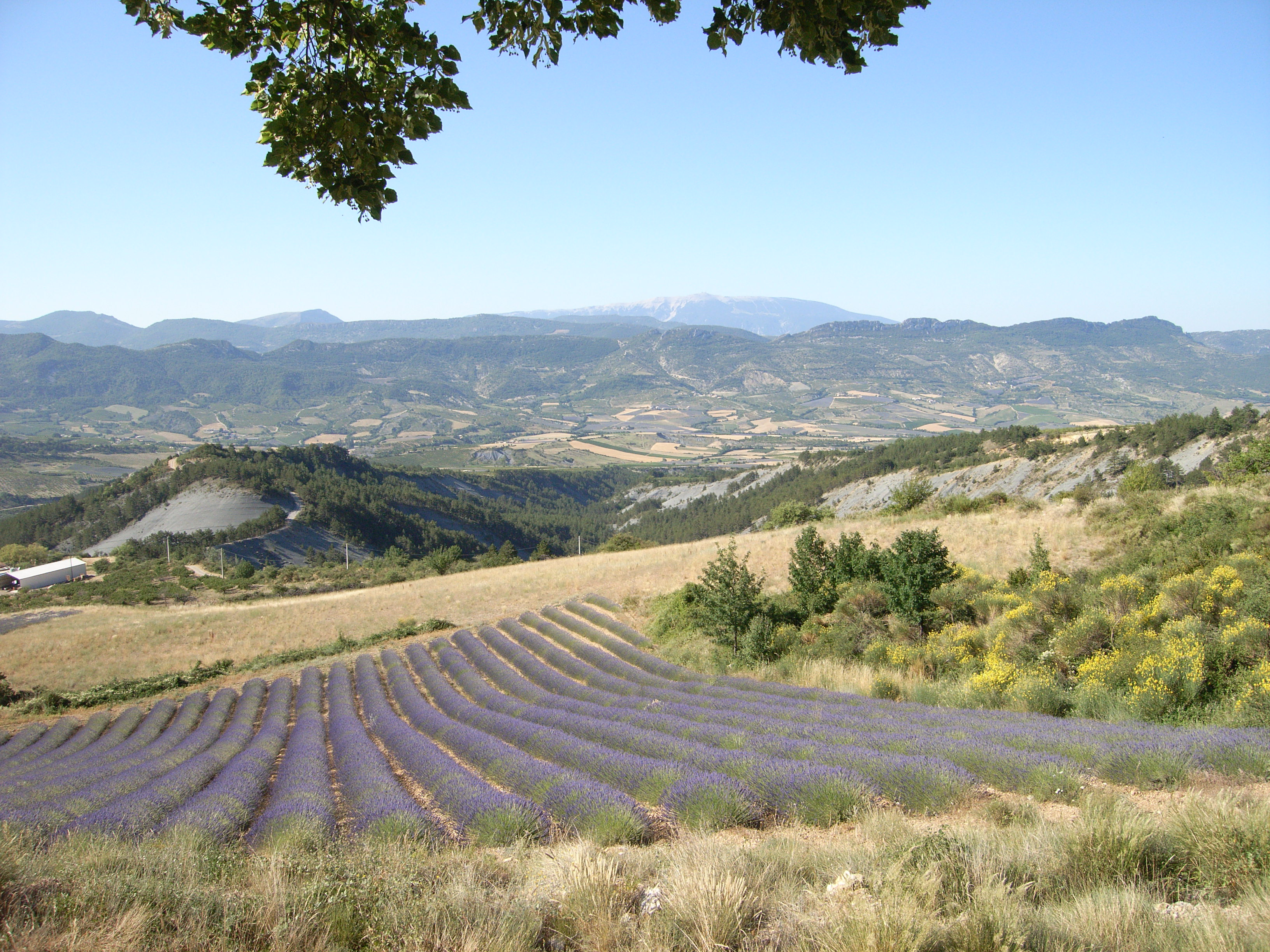 paysage des Baronnies - vallée de Sainte-Jalle - Mont Ventoux